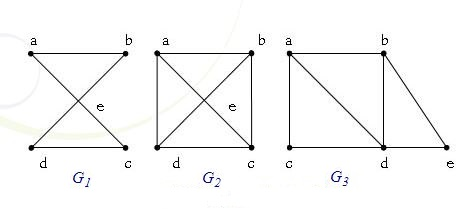 Đồ thị Euler - Đồ thị nửa Euler